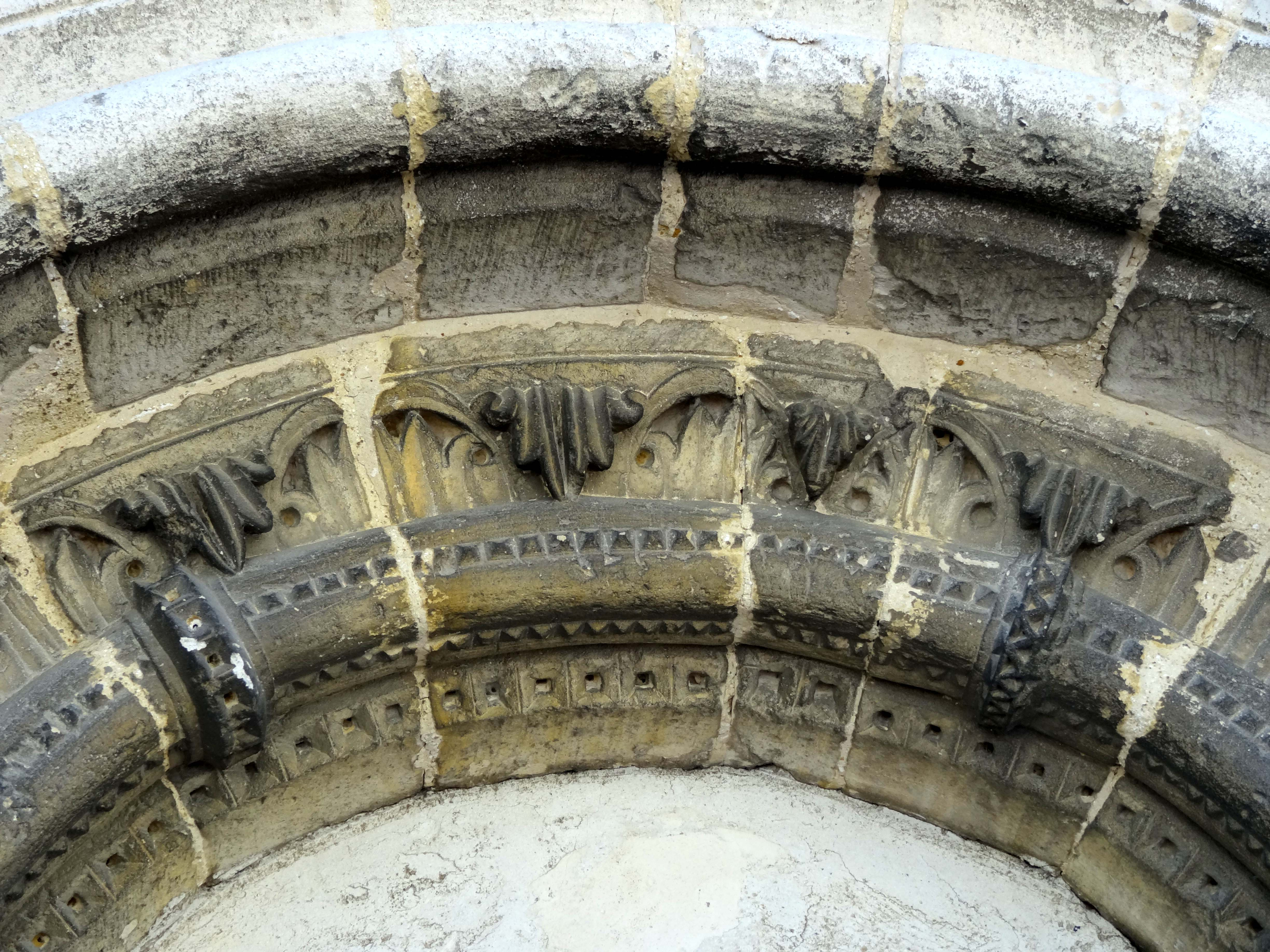 Église Sainte-Madeleine de Trie-Château - voir titre.